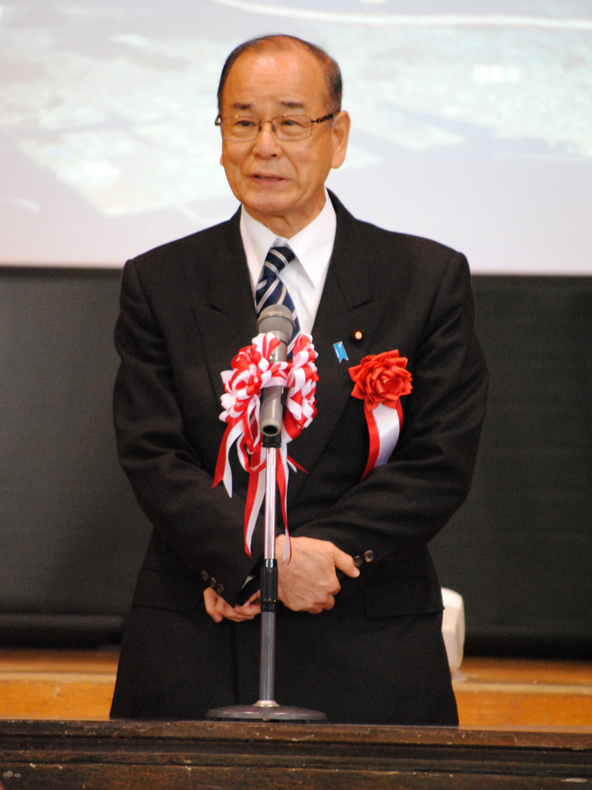 鈴木克昌。国道23号蒲郡バイパス（蒲郡IC～幸田芦谷IC）開通式典にて